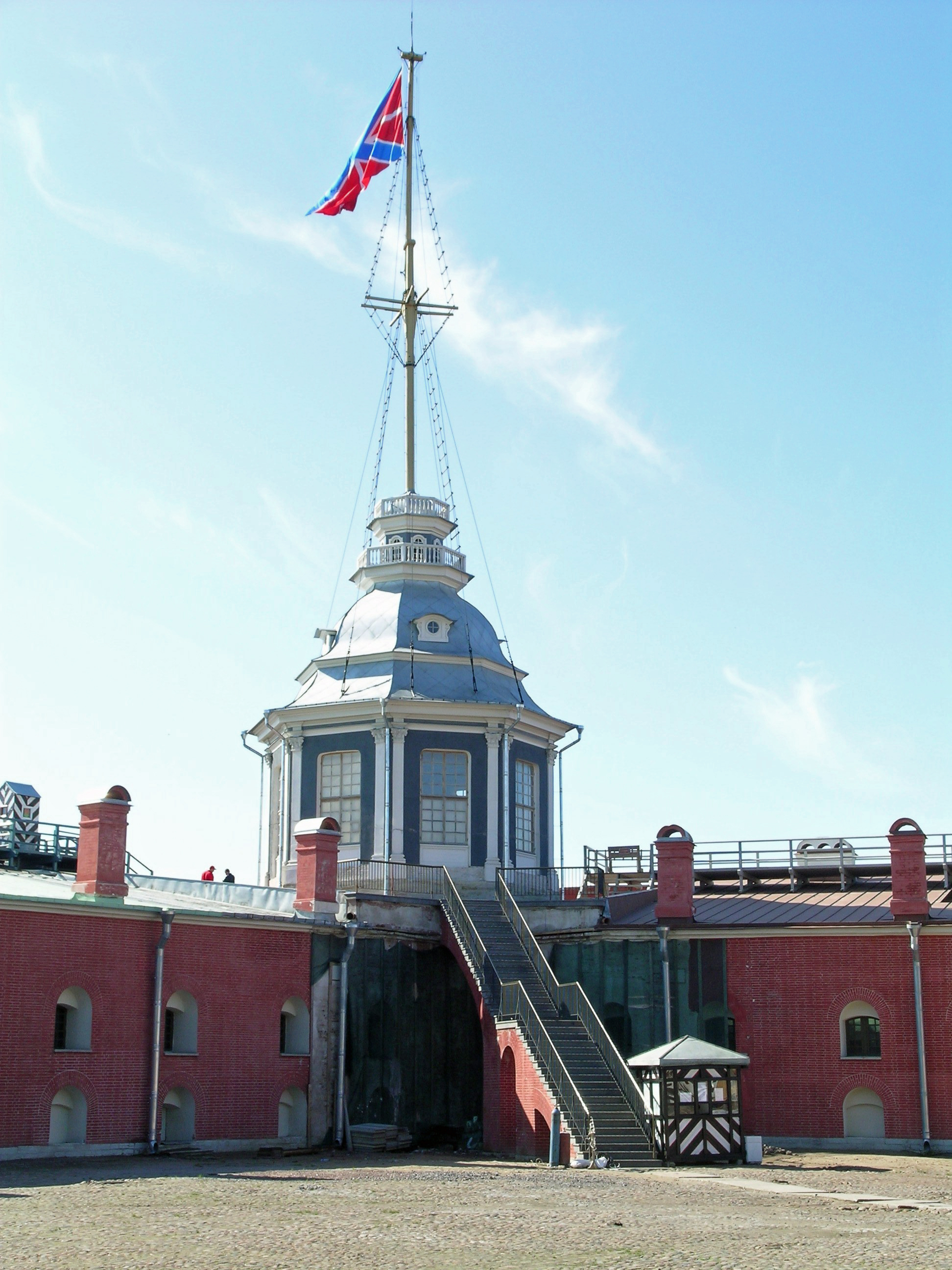 Im Innern der Peter-und Paul-Festung- Festungsmauer und Wachturm mit russischer Marineflagge